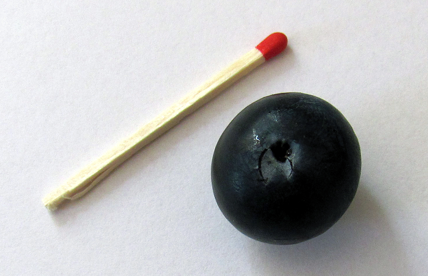 Zibartenfrucht